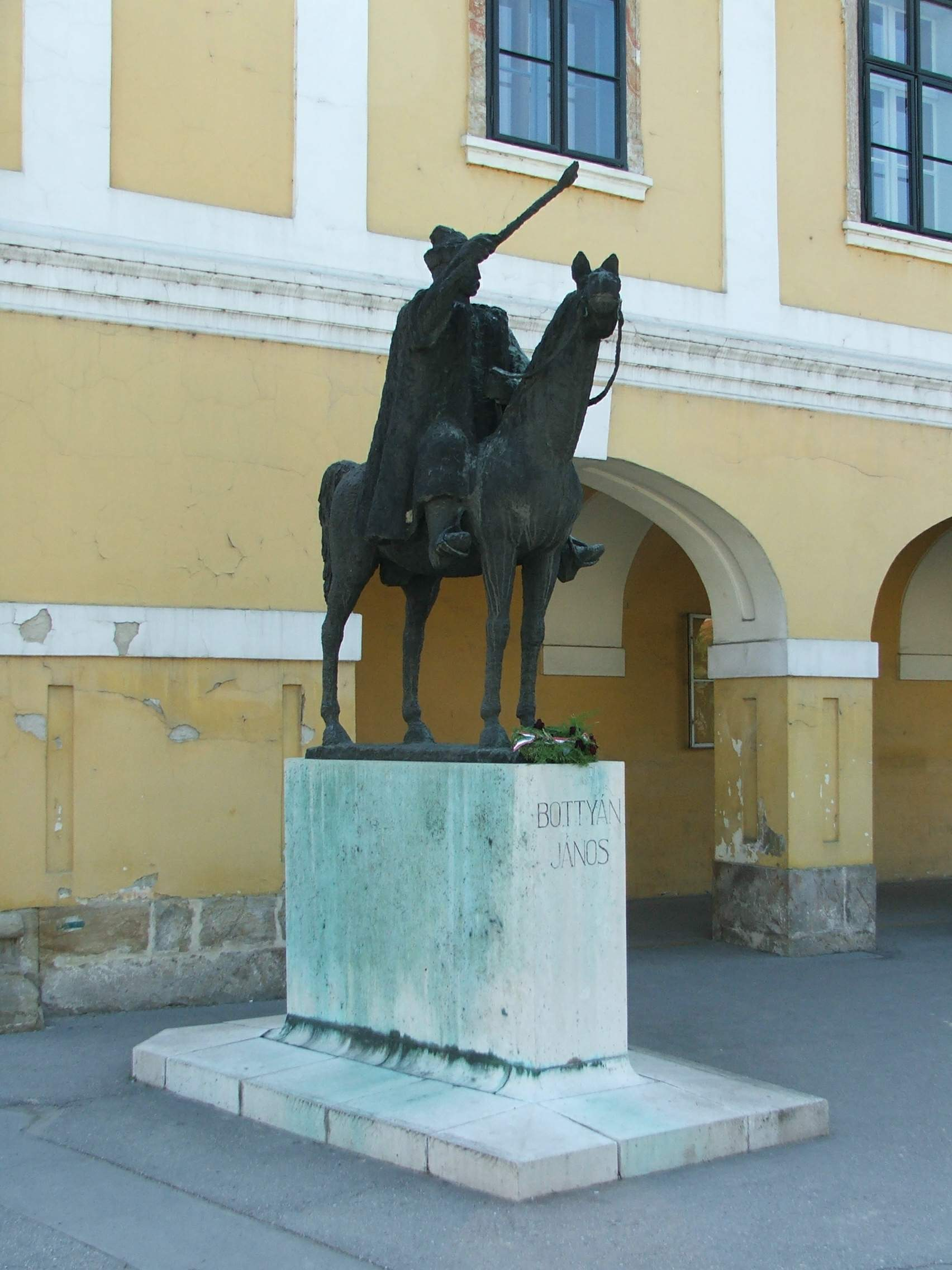 Bottyán szobor, Esztergom, Széchenyi tér(Vak) Bottyán János. (Martsa István, 1977) - Magyarország, Komárom-Esztergom megye, Esztergom, Bottyán János utca, A városháza belső parkolójában?